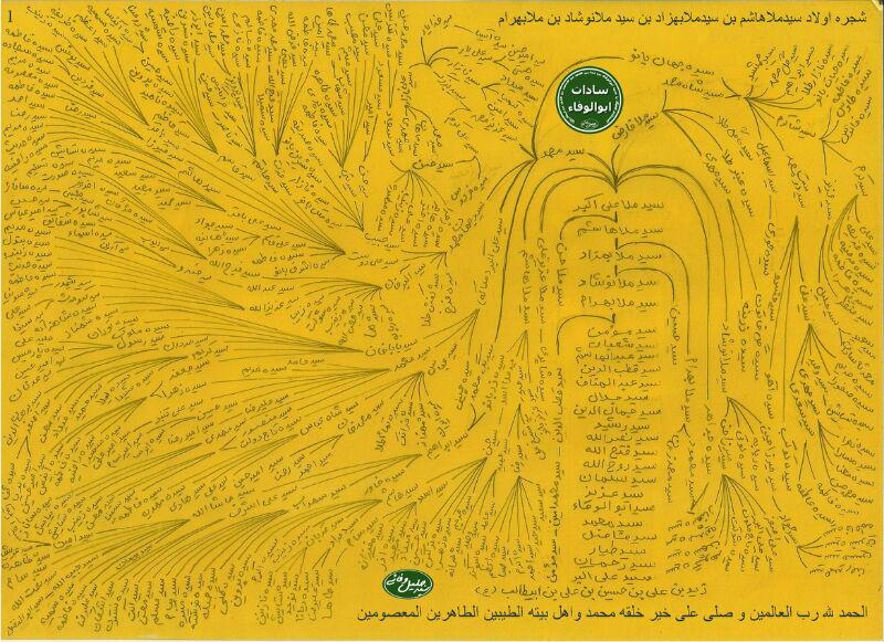 شجره-نامه-سادات-ابوالوفاء-کوهدشت-عکس-1